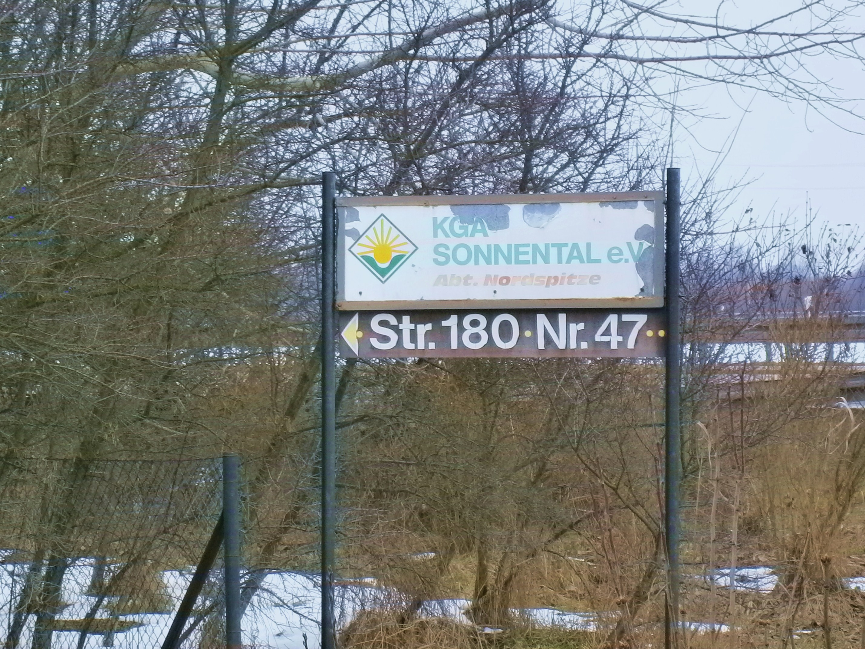 Straße 180 ist eine Straße im Ortsteil Berlin-Französisch Buchholz (hier in Blickrichtung: KGASonnentalWest)